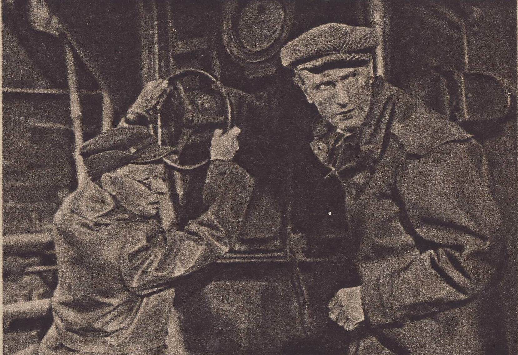 Kręcenie filmu Stalowe serca: Władysław Hańcza (po prawej) i Edmund Biernacki